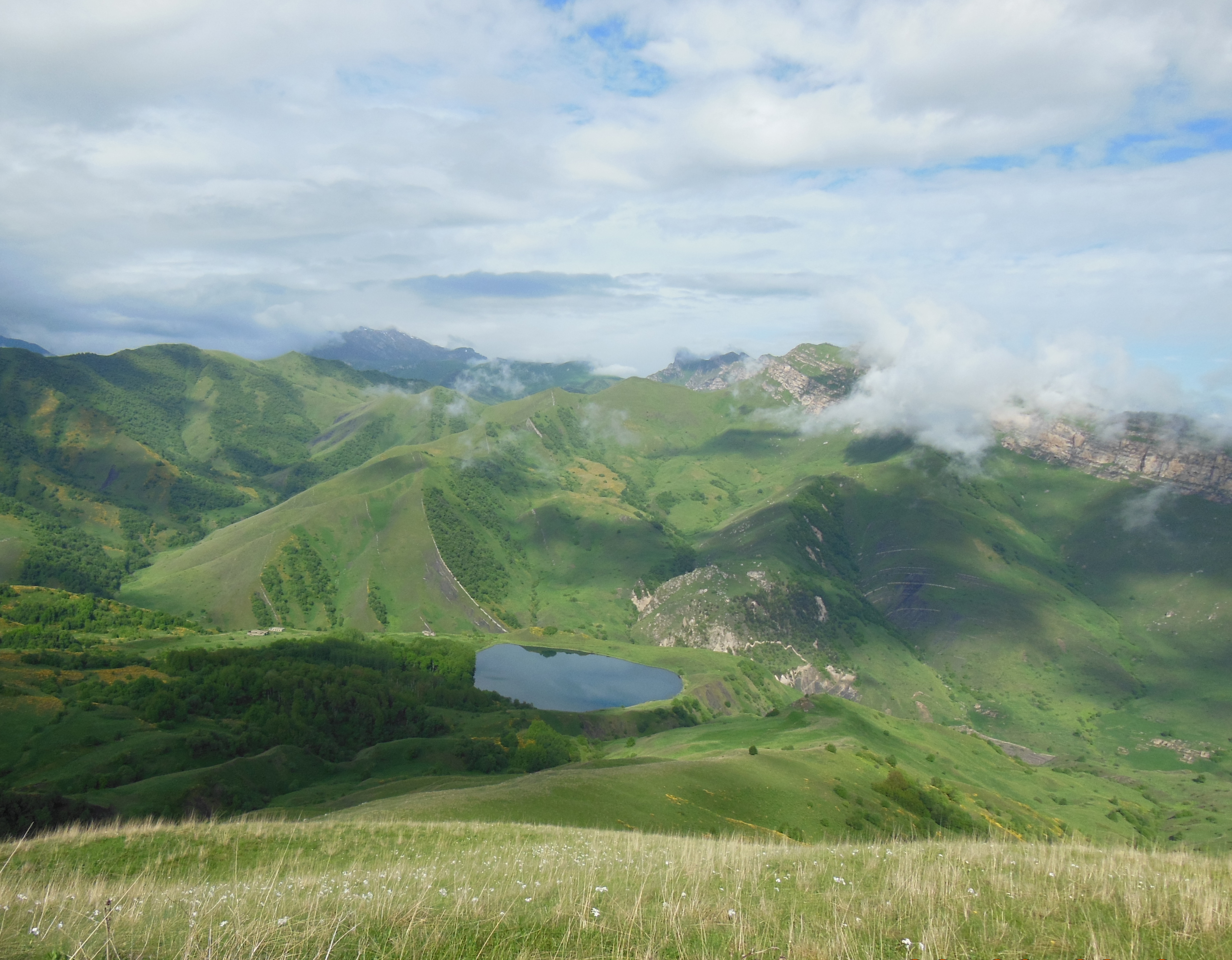 оз.Галанчож (чеч. Галайн-Іам) — озеро в Галанчожском районе Чеченской республики.